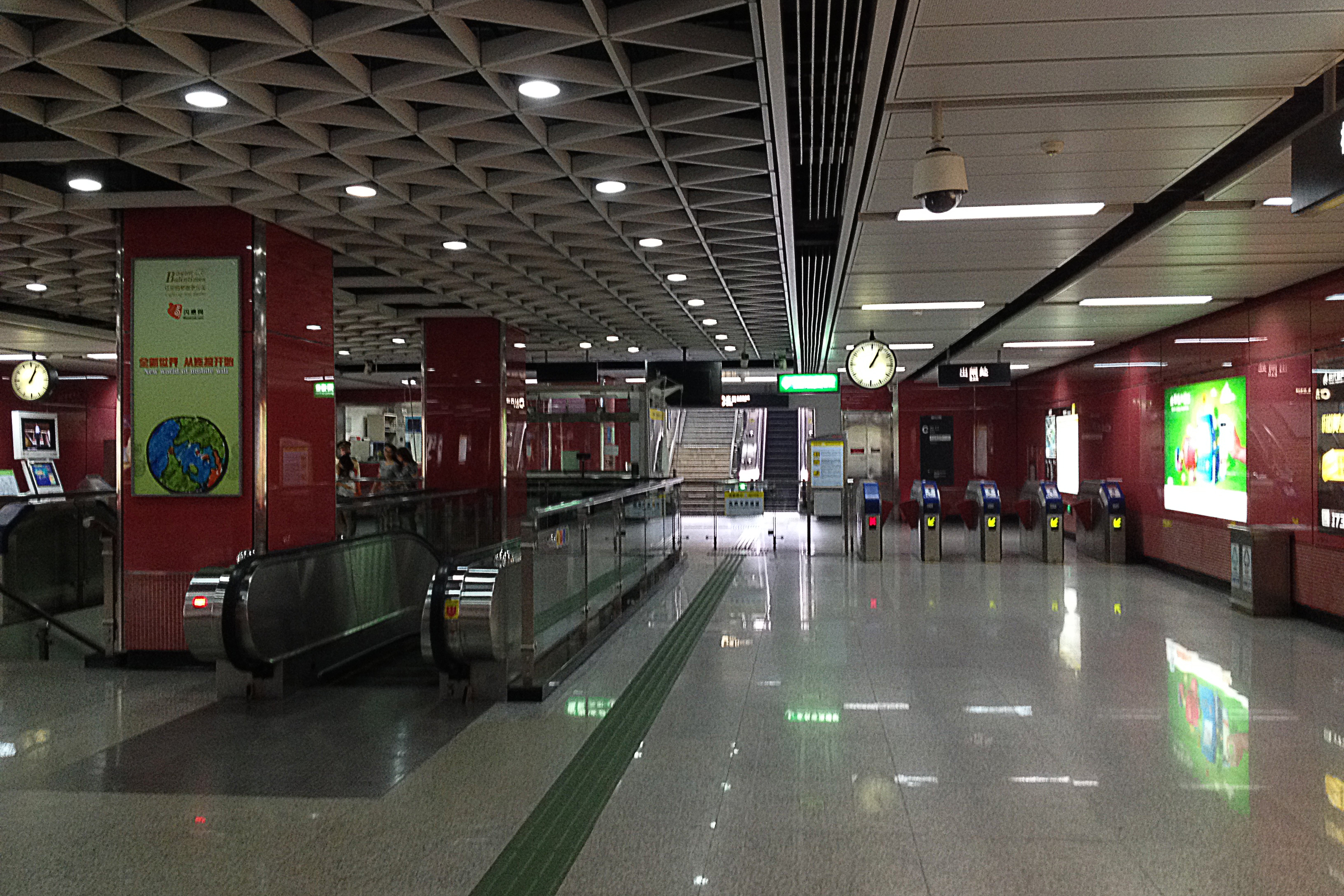 广州地铁大沙东站站厅